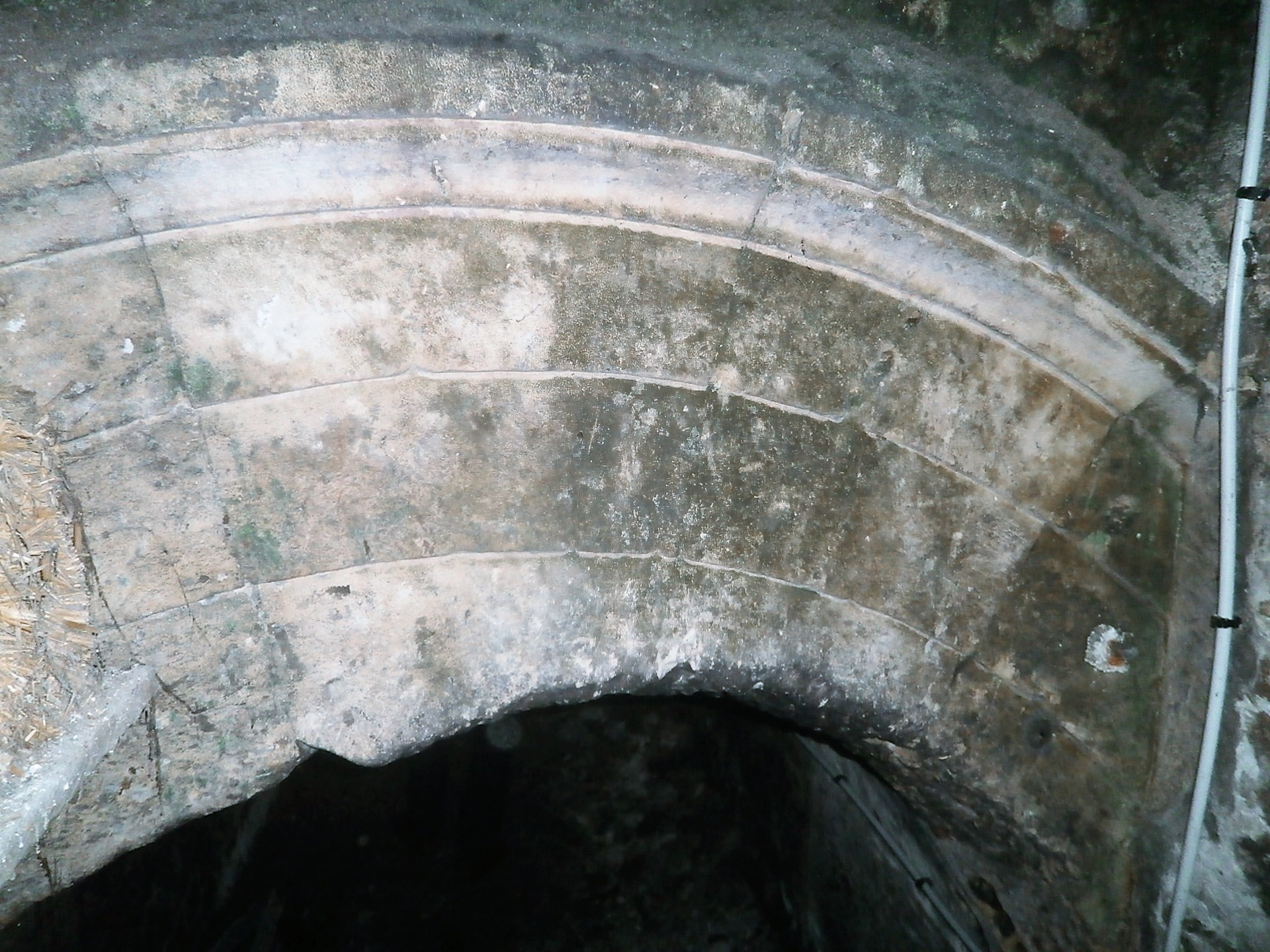 Arc surmontant l'entrée de l'un des vomitoires secondaires.